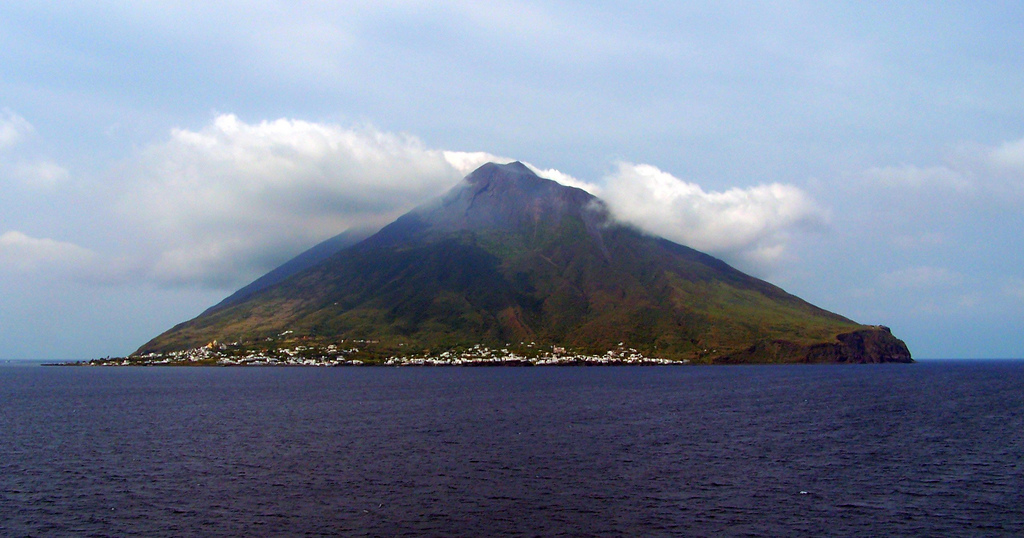 frames 2007 favs europe